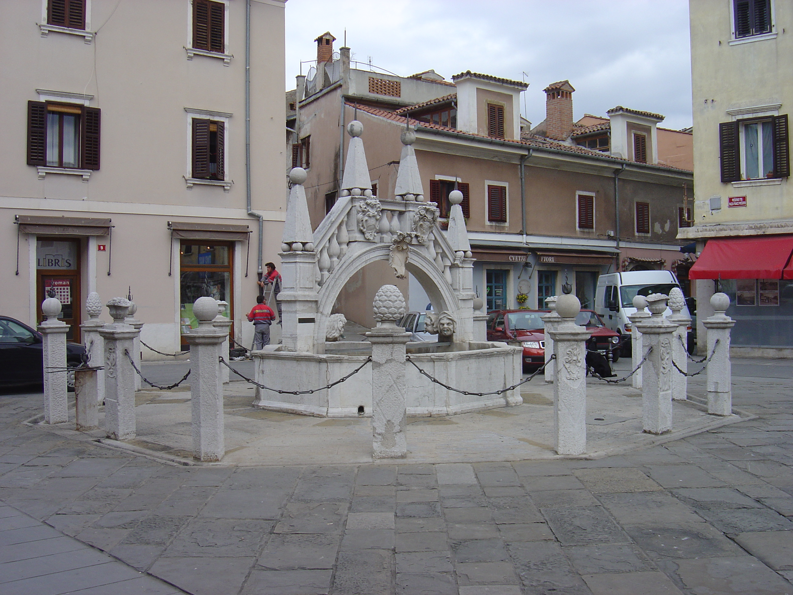 Koper, Slovenia - VODNJAK DA PONTE / Fontana Da Ponte / Da Ponte fountain